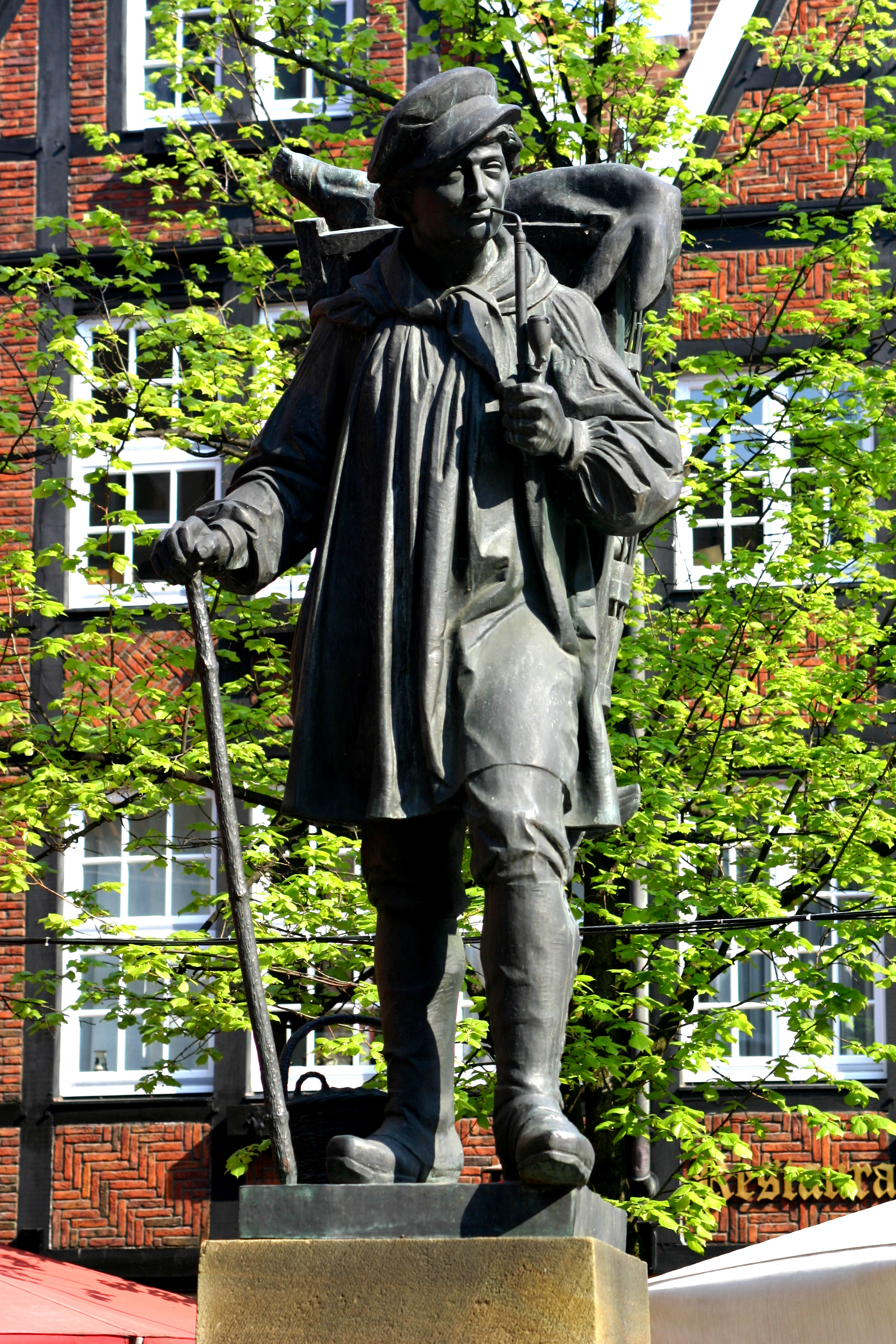 Der Kiepenkerl: Das Standbild des reisenden Händlers aus dem Münsterland befindet sich seit 1896 auf dem Spiekerhof in Münster. Es zeigt einen Kiepenkerl mit Tragekorb, Pfeife, Knotenstock und Leinenkittel.